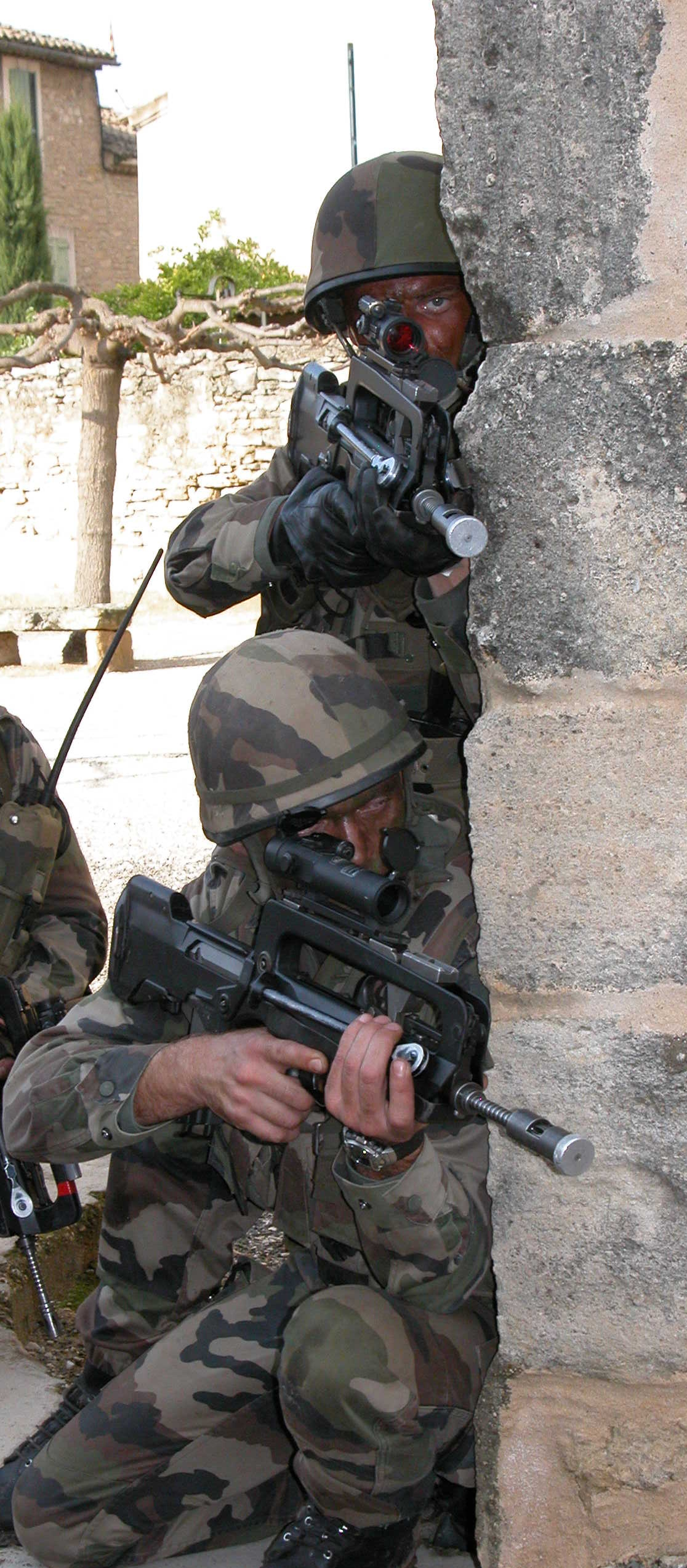 Binôme du 2e Régiment étranger d'infanterie en combat en zone urbaine